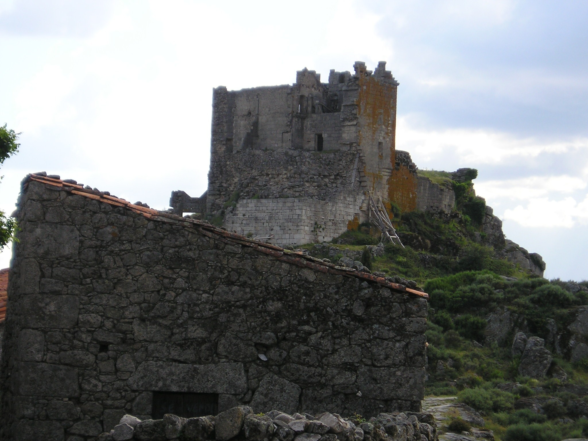 Villamieleko gaztelua